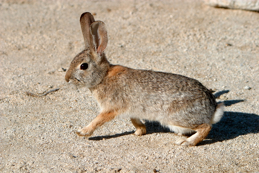 Desert cottontail (Sylvilagus audubonii) in Anza Borrego State Park.